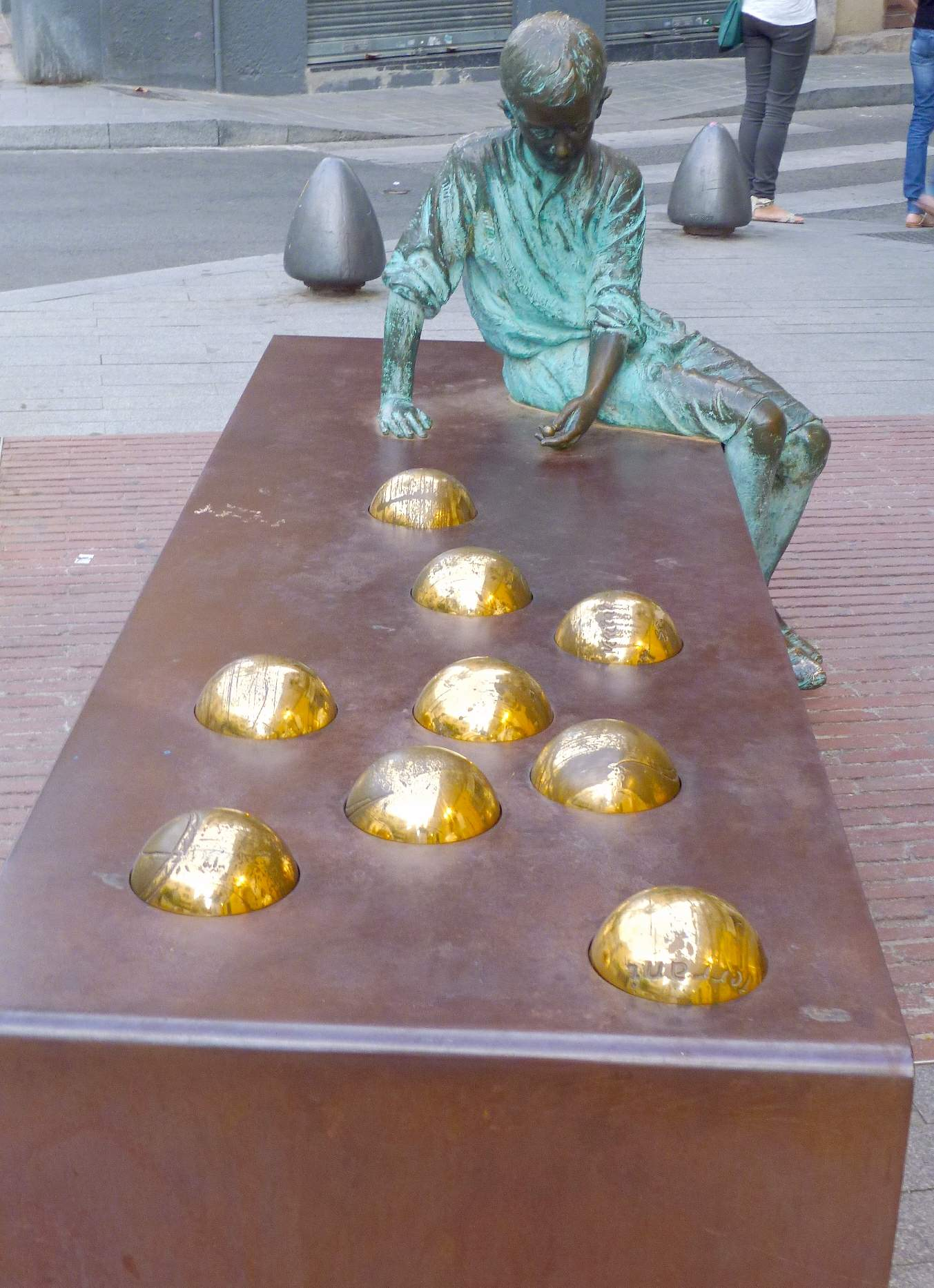 Escultura en Reus: Gaudi adolescente (2002, Artur Aldoma)